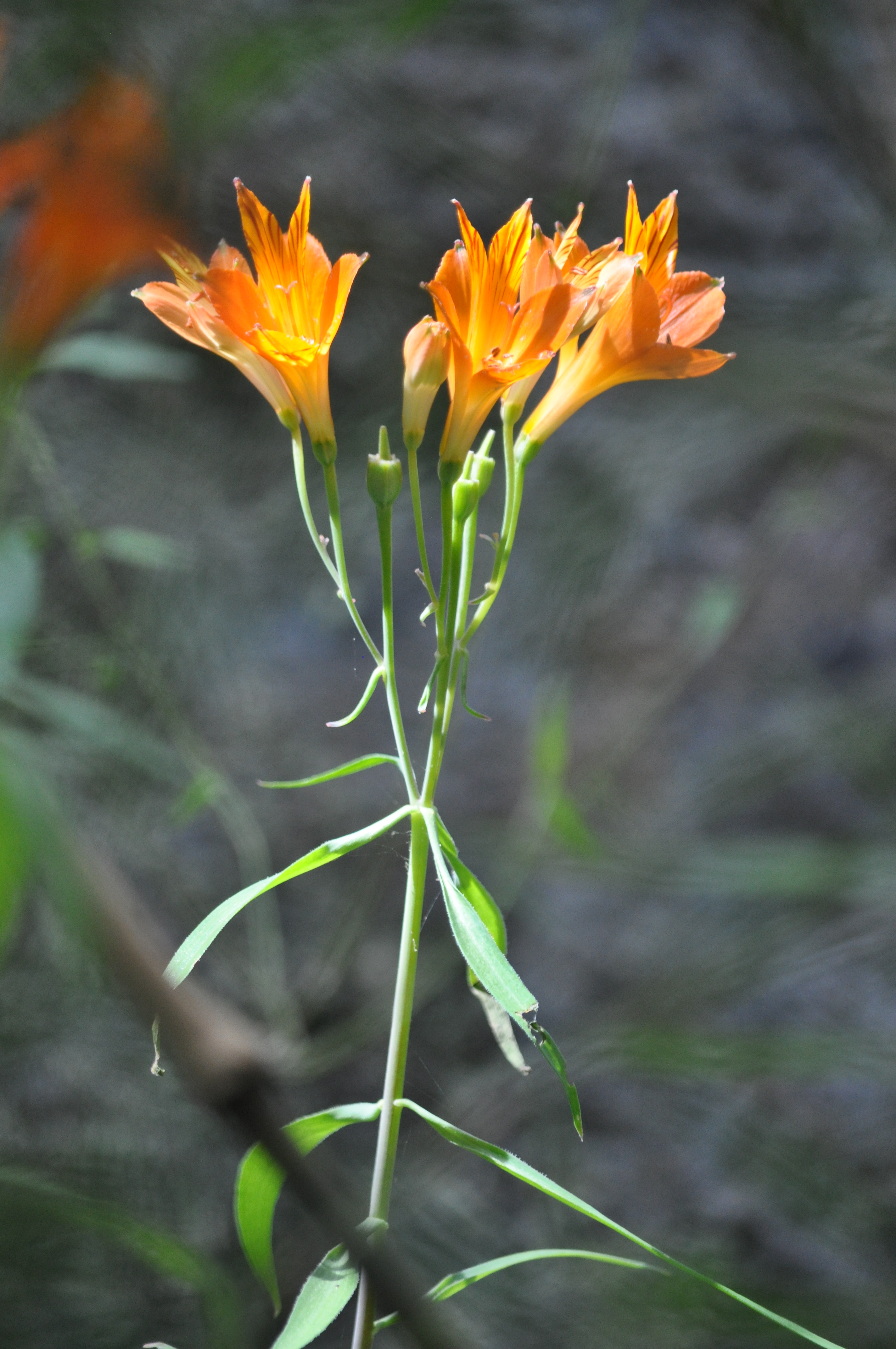 Alstroemeria ligtu,var.Simsii, Parque Nacional La Campana. Fotografía tomada en la "Primera Aguada", del "Sendero del Andinista"